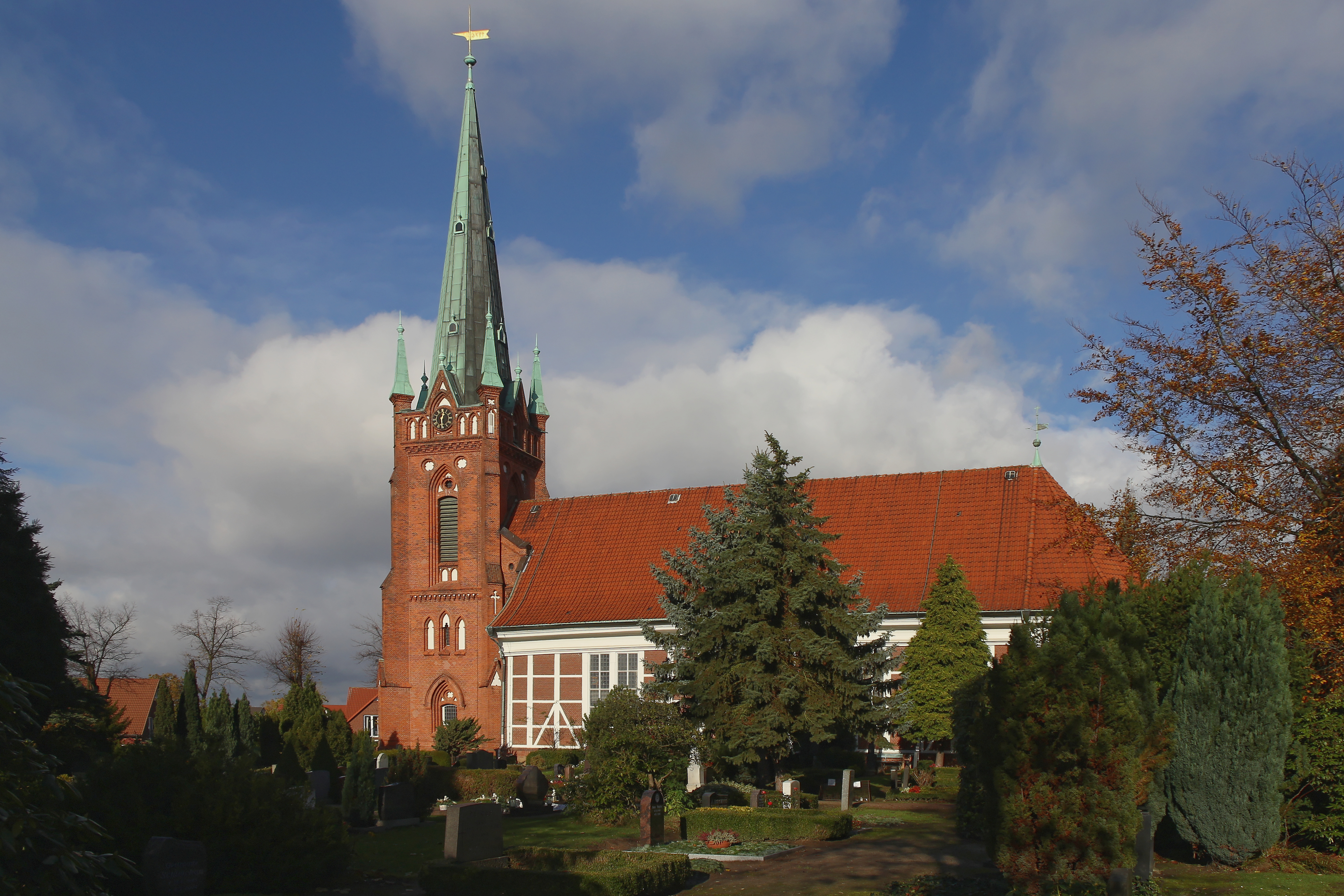 Hamburg-Moorfleet, St. Nikolai, Südostansicht